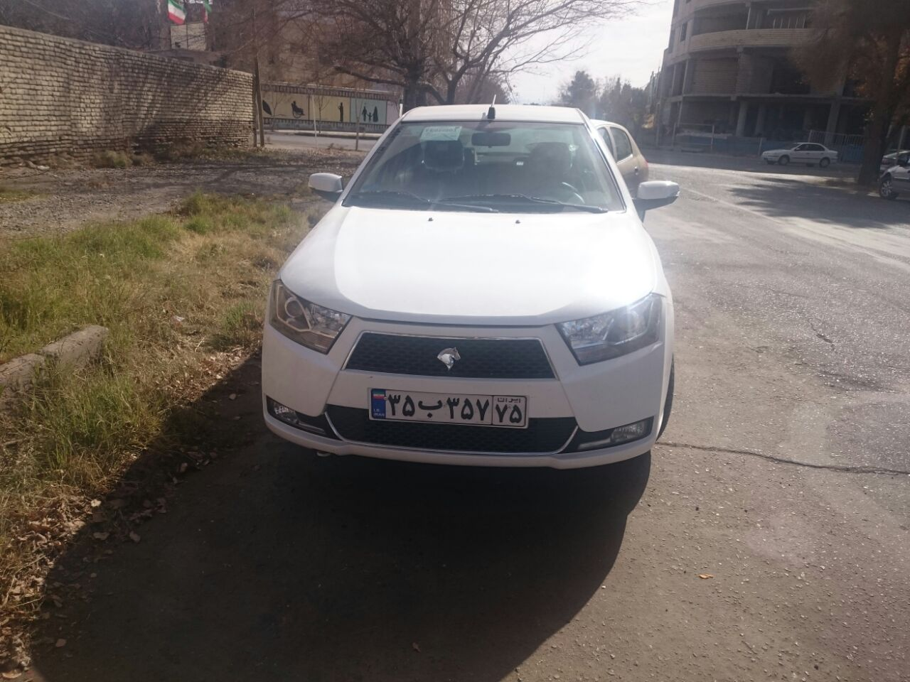 نمای جلو خودرو دنا